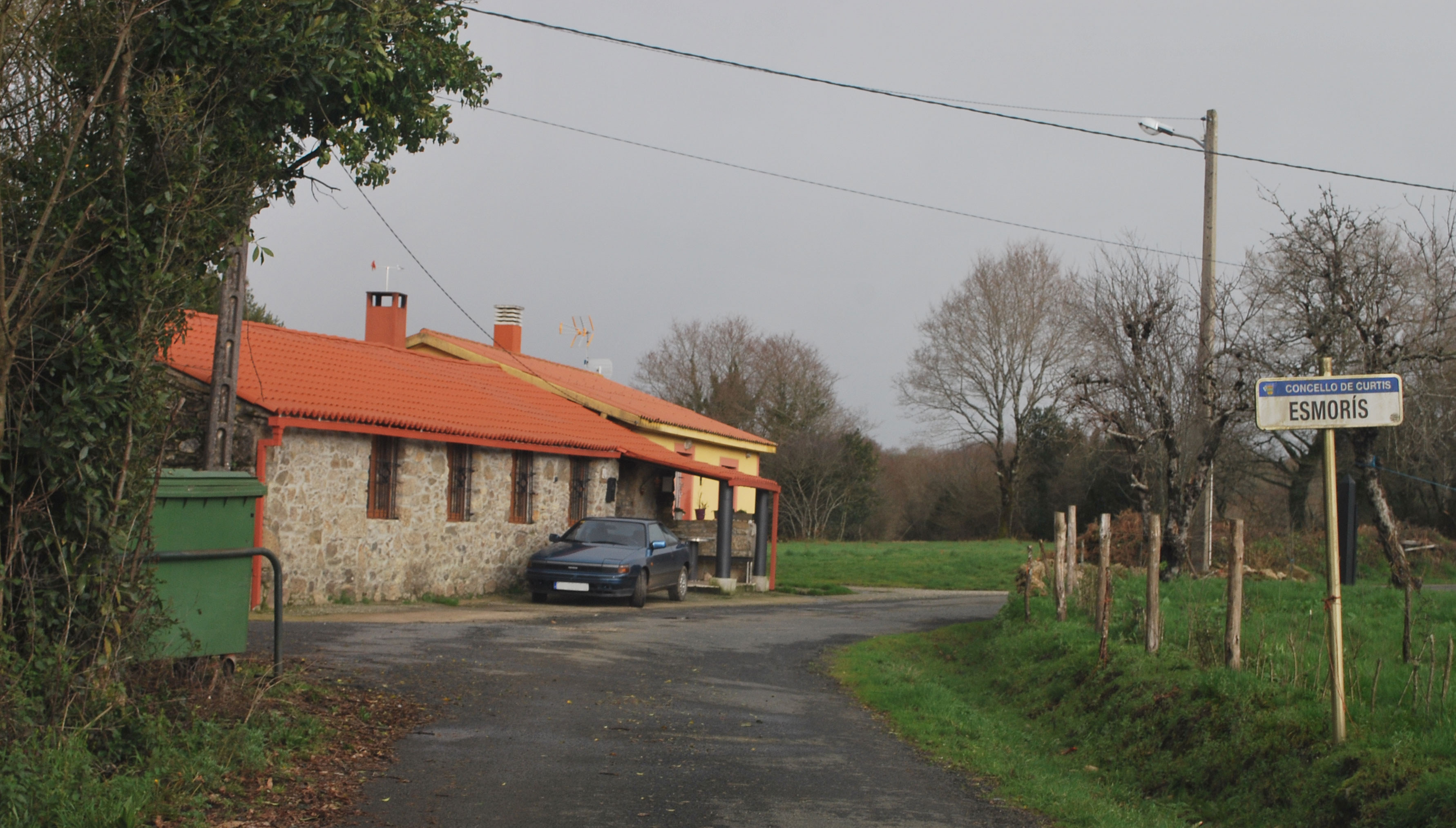 Vista de Esmorís en Fisteus, Curtis A Coruña Galiza Spain